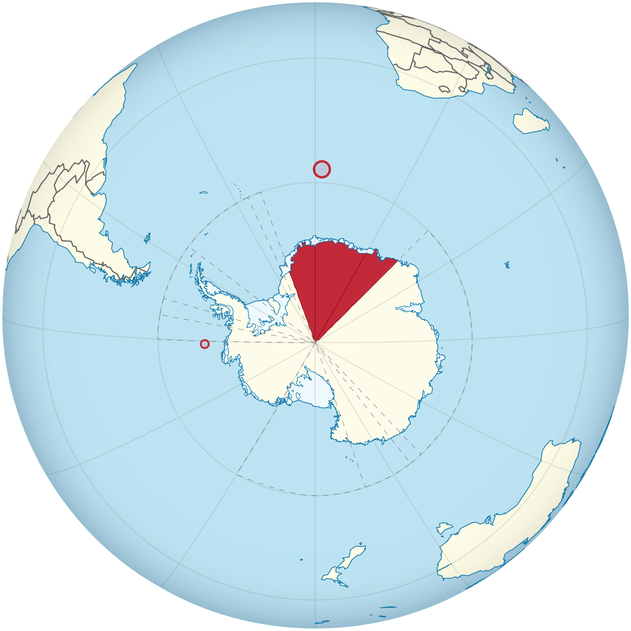 Norske biland